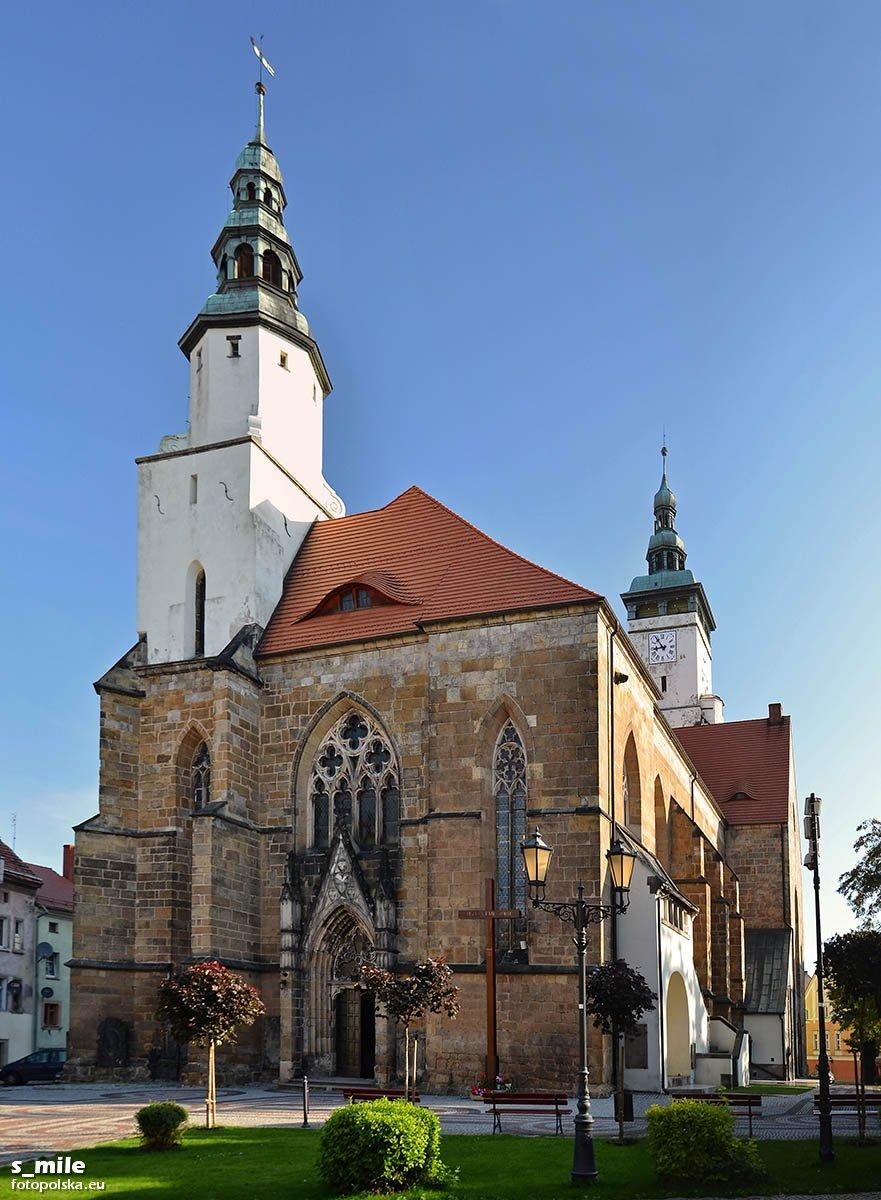 Kościół Narodzenia NMP